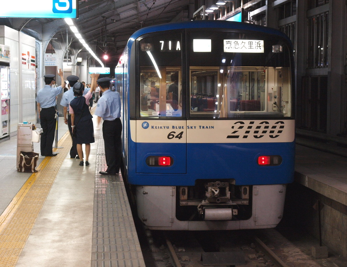 京急ウィング号 2157編成「KEIKYU BLUE SKY TRAIN」